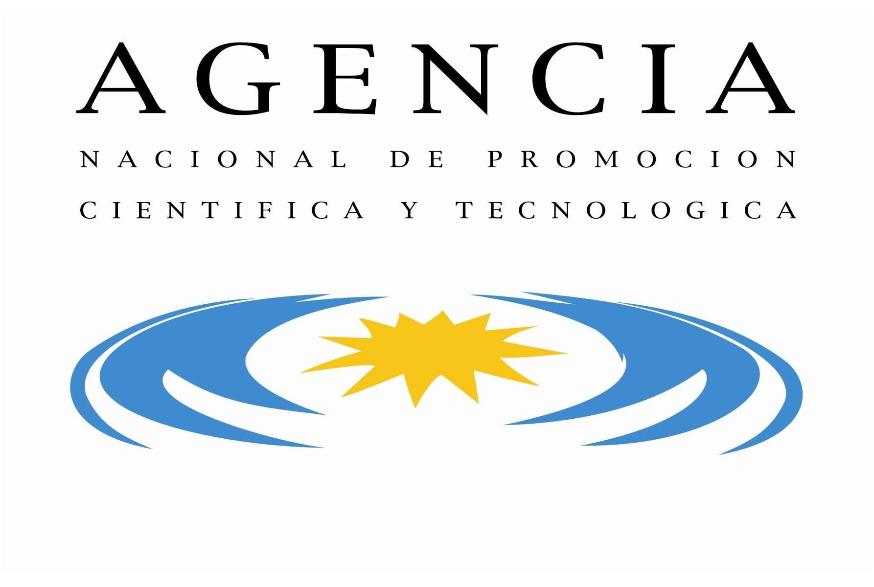 Logo Agencia Nacional de Promoción Cientifica y Tecnológica